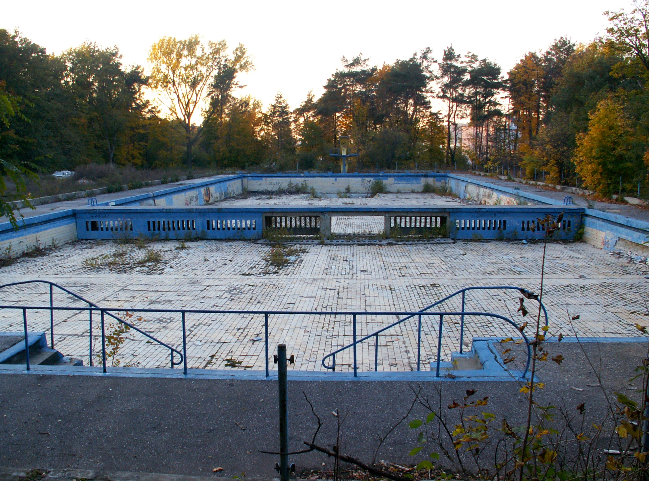 Stadion Leśny w Kielcach